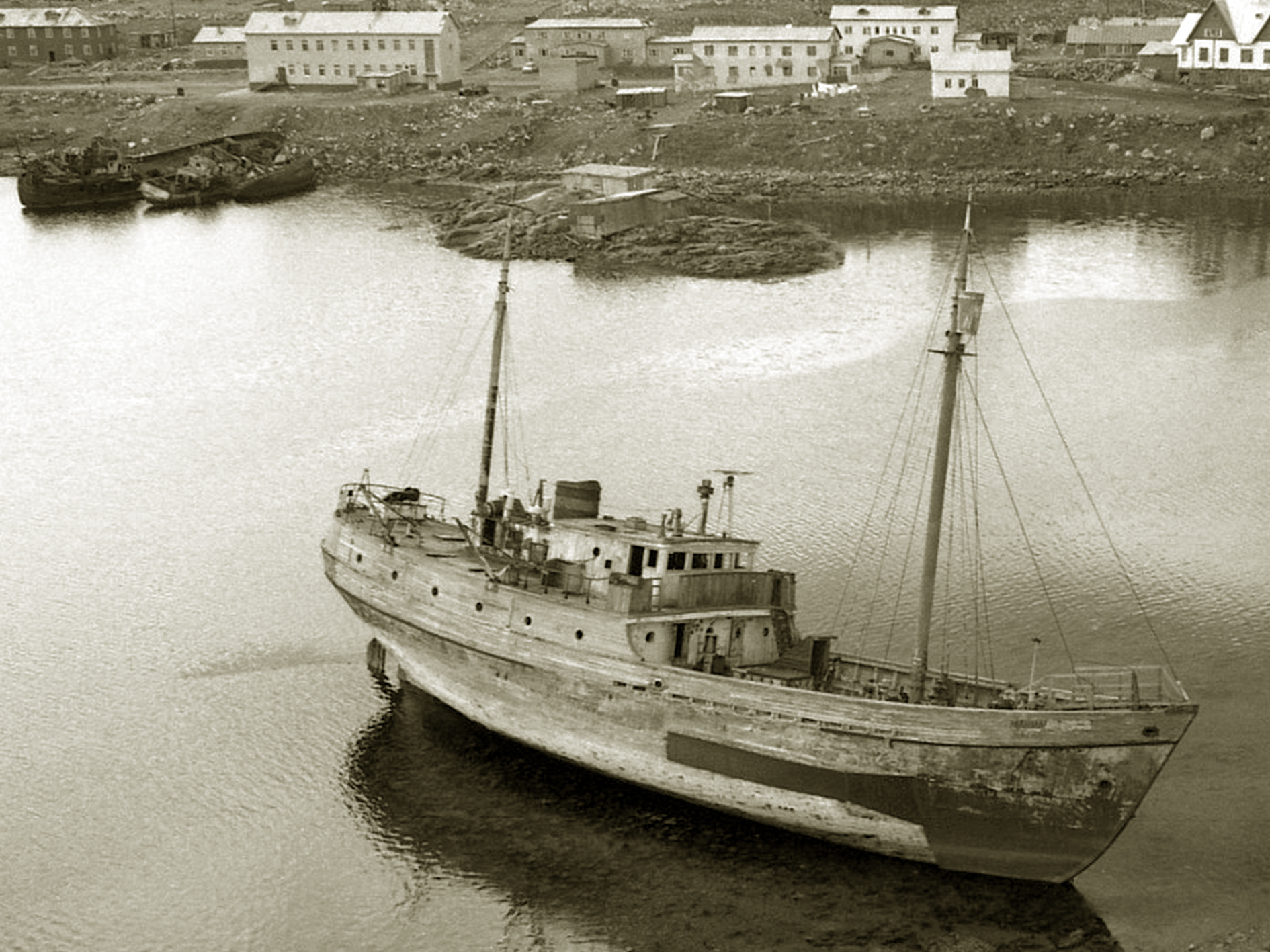 Гидрографическая шхуна "Секстан" (после 1918 г. "Секстант") у острова Нарген